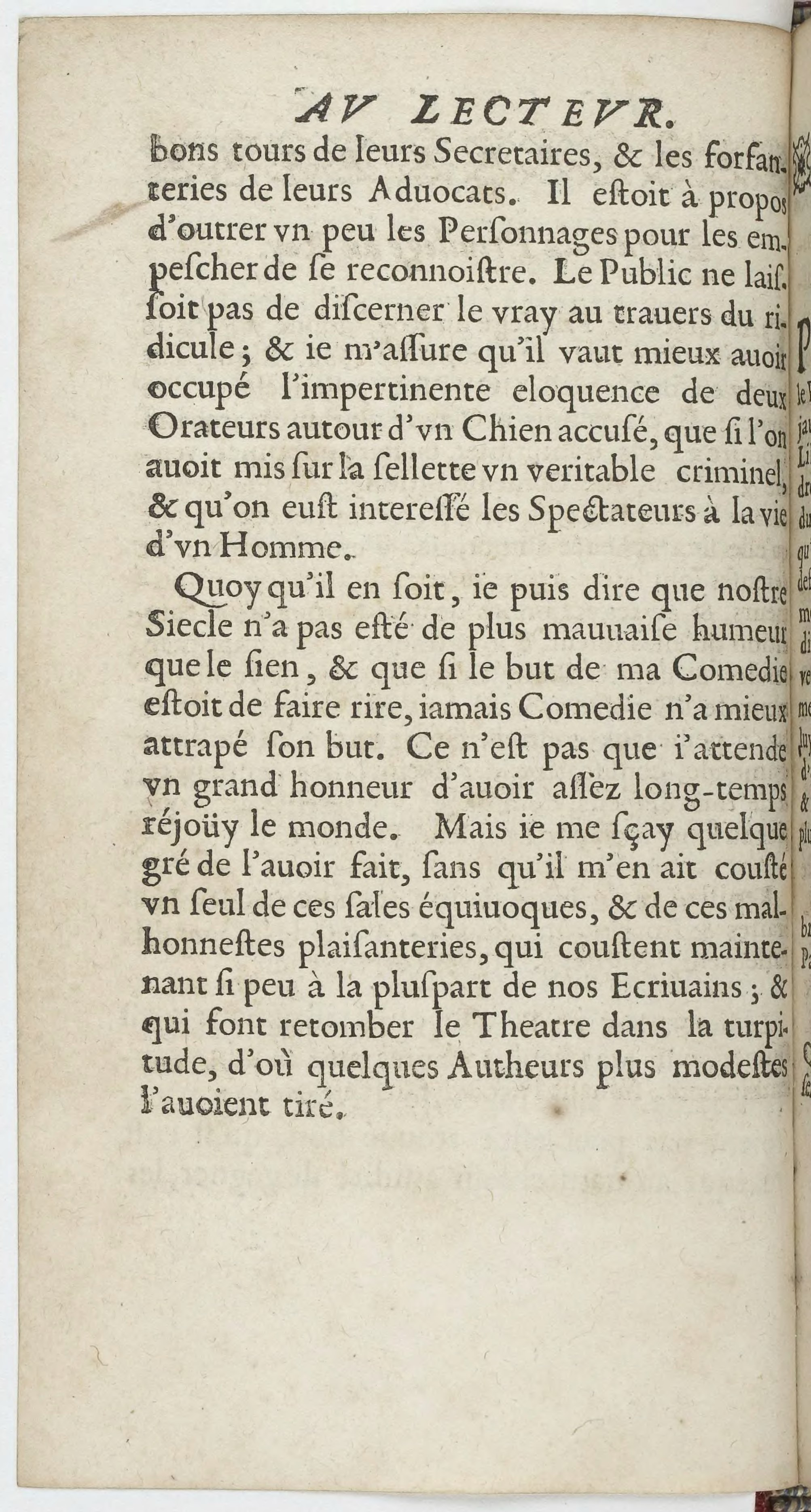 Page 12 de la première édition des Plaideurs de Jean Racine. Attaque contre Molière dans la préface